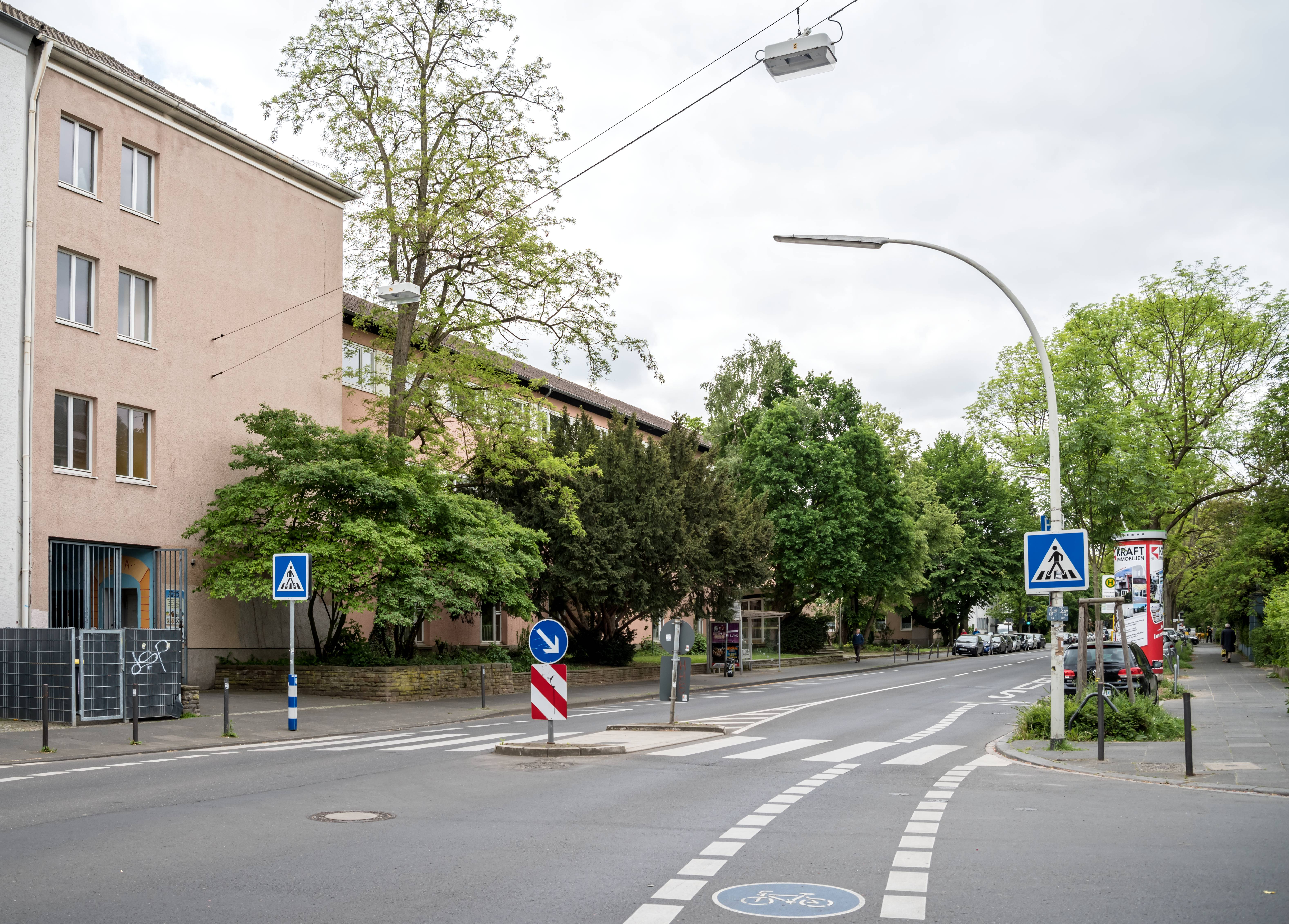 Bilder aus Bonn Das Ernst-Moritz-Arndt Gymnasium in der Endenicher Allee in Bonn-Poppelsdorf Der Neubau wurde am 12. Juni 1951 begonnen. Die ersten 12 Klassen wurden ab dem 3. November 1952 in neuen Räumen unterrichtet. Am 20. Februar 1953 wurde der gesamte Unterricht in den neuen Räumen gehalten. Die Einweihung war am 18. Juni 1953 Das Schulgebäude wurde 2006 unter Denkmalschutz gestellt, da es "charakteristisch ist für die Schularchitektur der Nachkriegszeit"